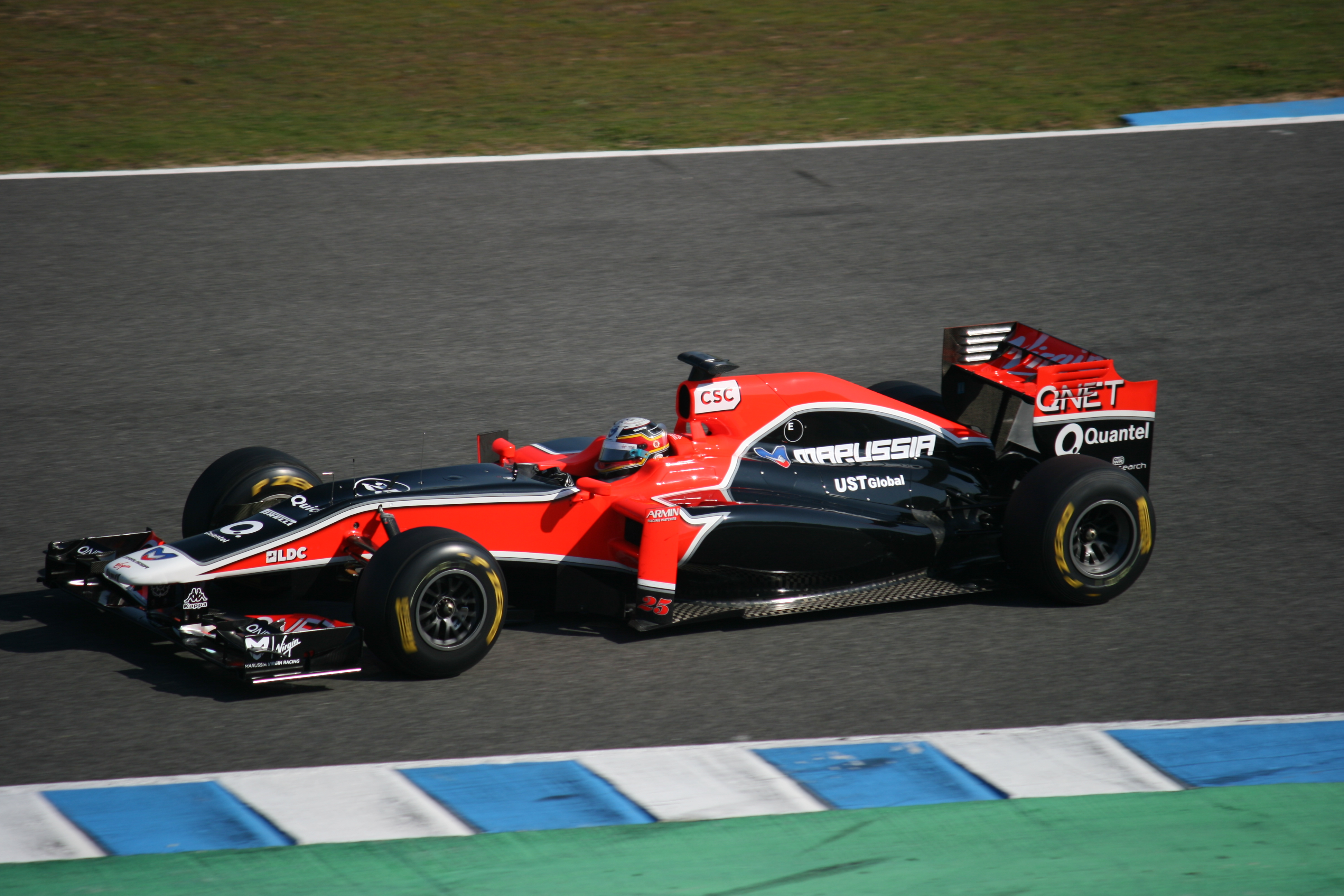 d'Ambrosio